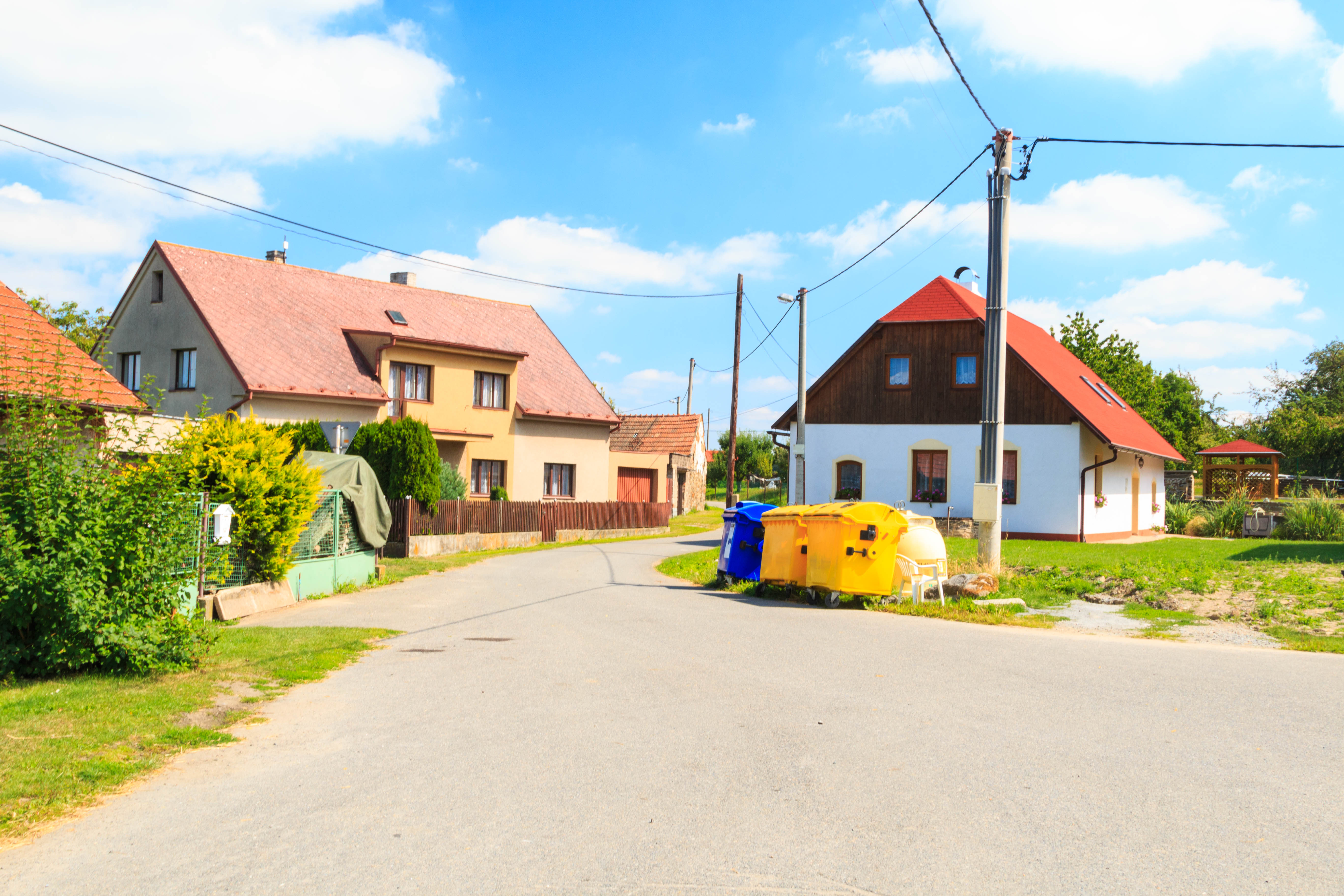 Pokřikov - čp. 62